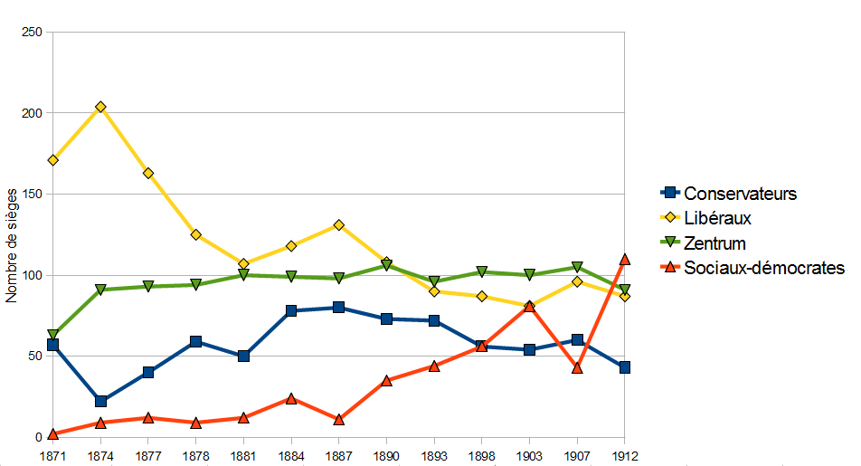 Èvolution du nombre de sièges des différents partis allemands au élections législatives du Reichstag entre 1871 et 1912.